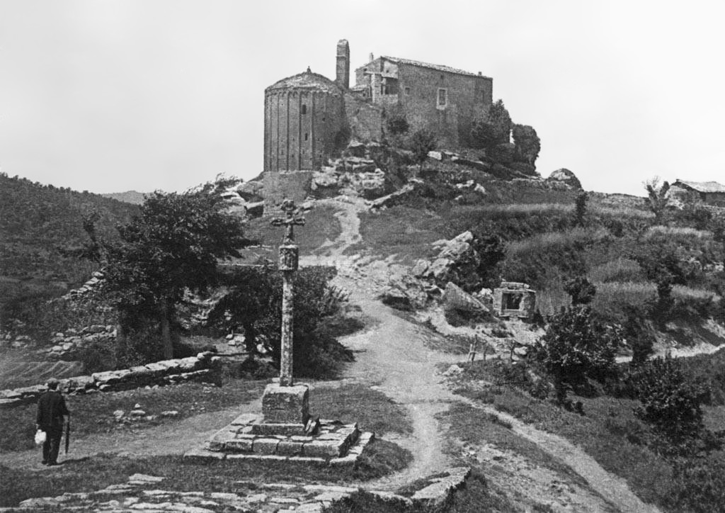 L'església vella de Madrona, i una creu de terme en primer terme. Cèsar August Torras i Ferreri (Entre 1890 i 1923)